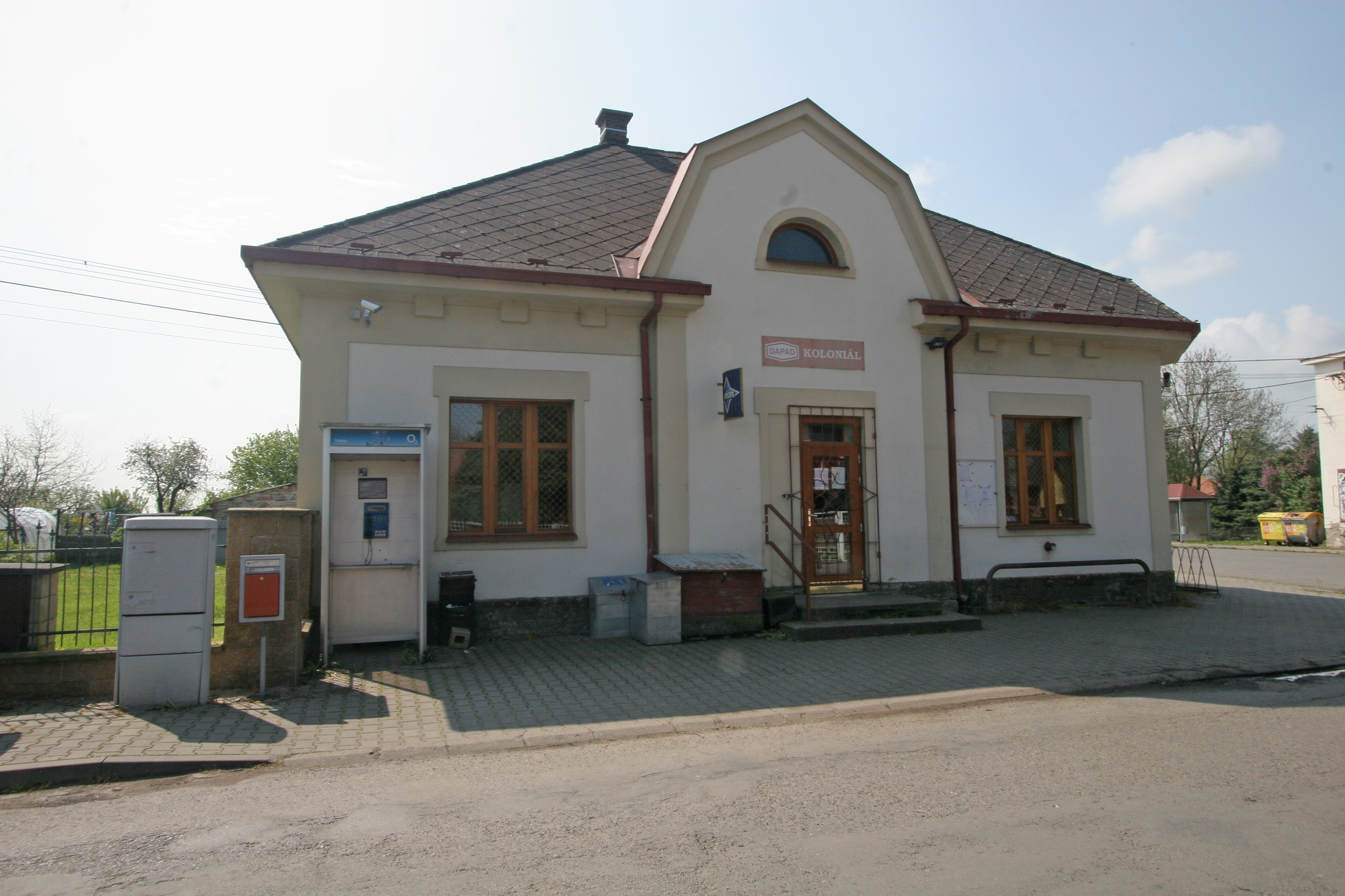 Lány u Dašic obecní úřad